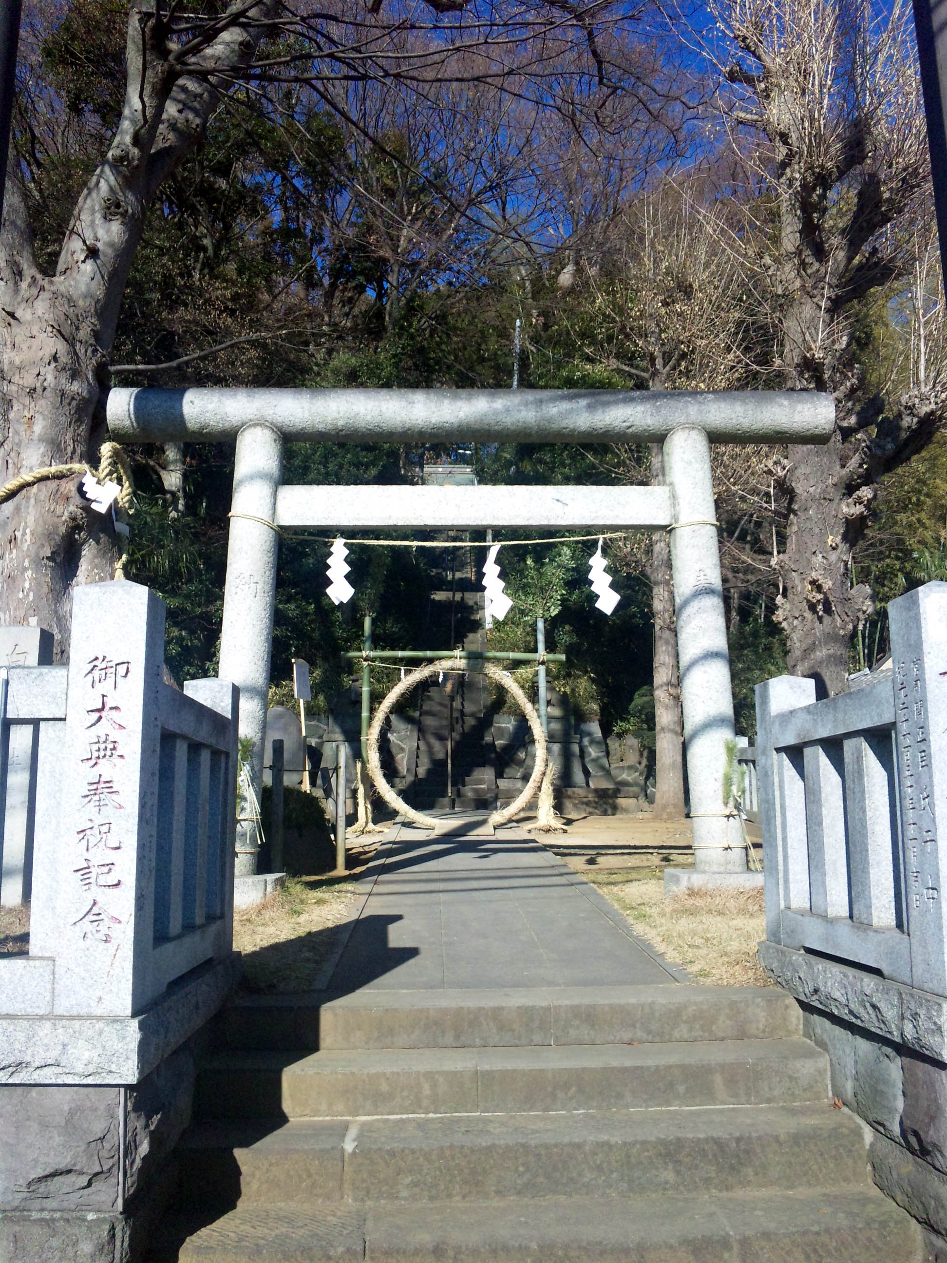 平戸町 (横浜市)にある白旗神社